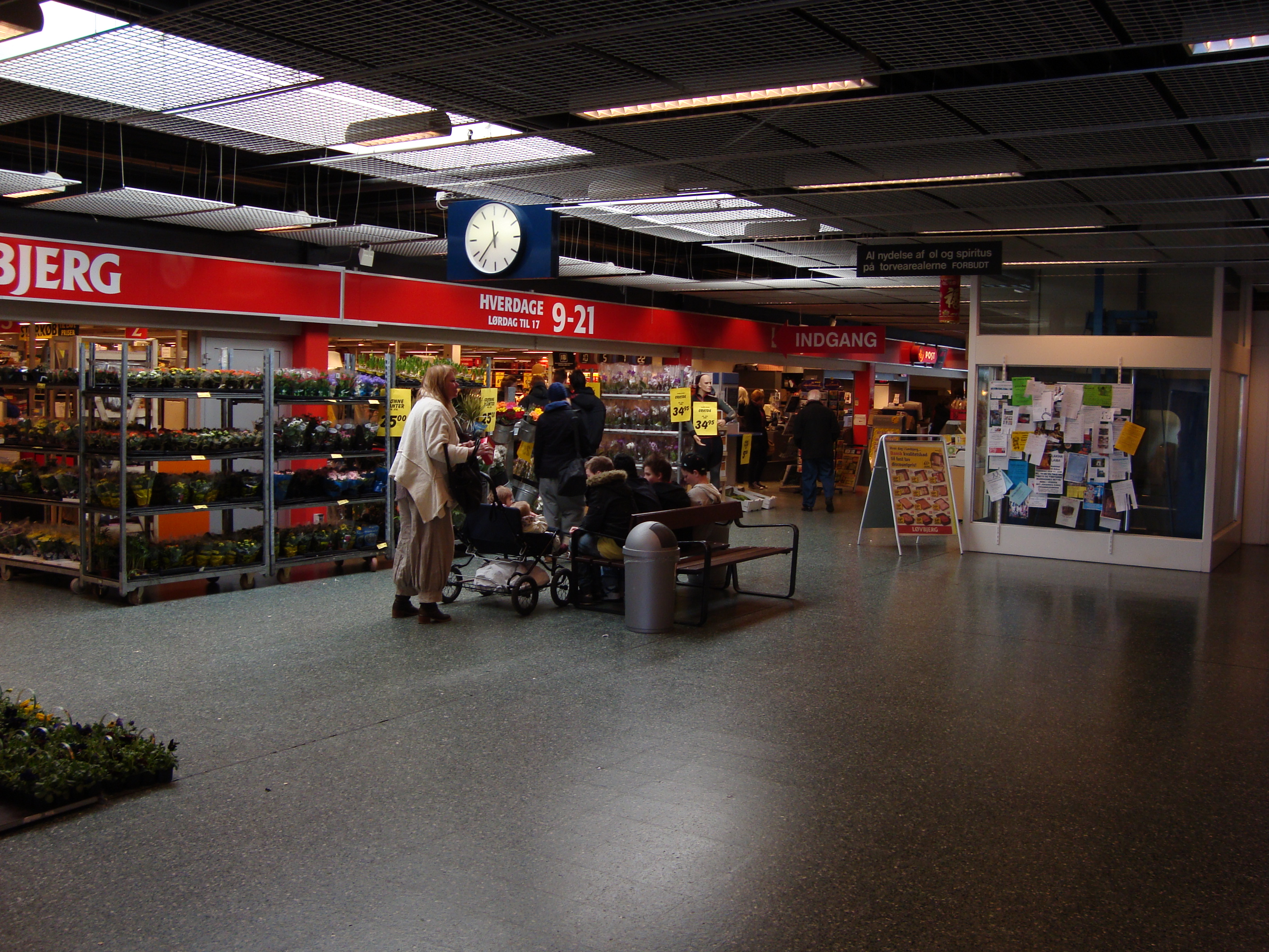 Løvbjergsupermarkedet i Trøjborg Centret i Århus